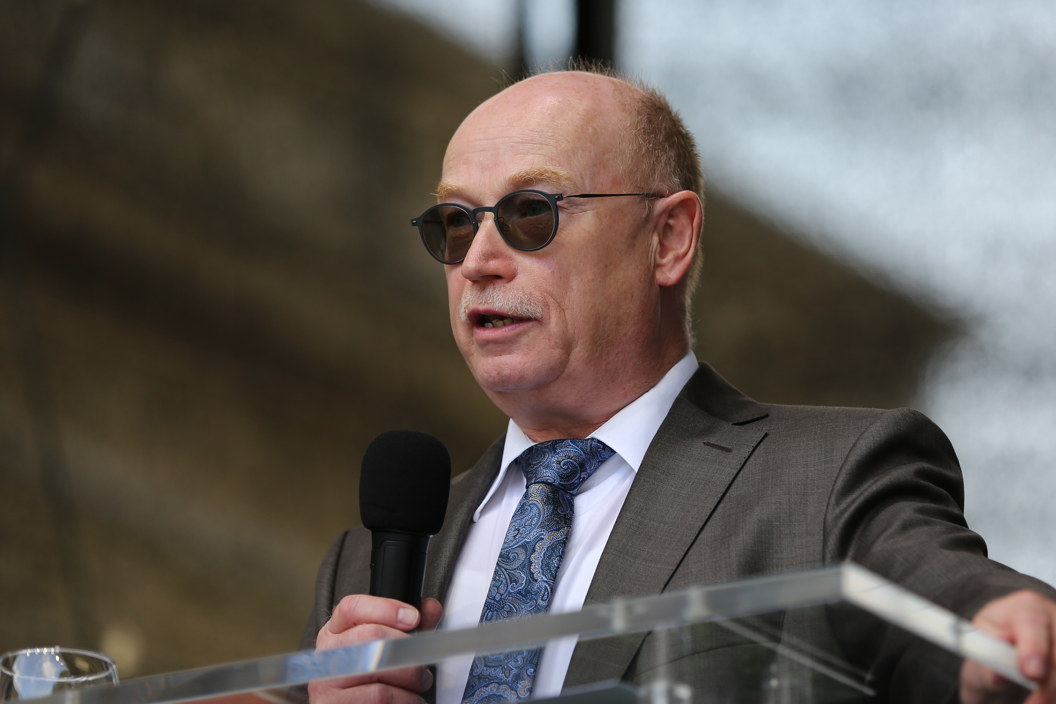 Martin Stratmann, Präsident der Max-Plack-Gesellschaft am Max-Plack-Tag in München, 2018-09-14